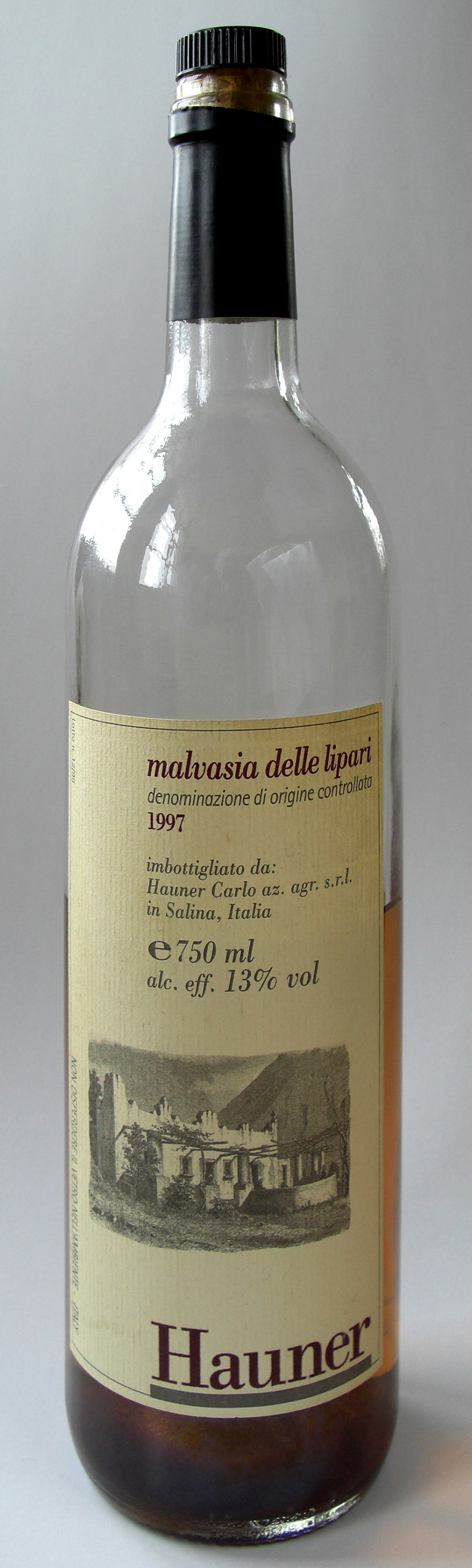 Malvasia delle Lipari DOC, Hauner